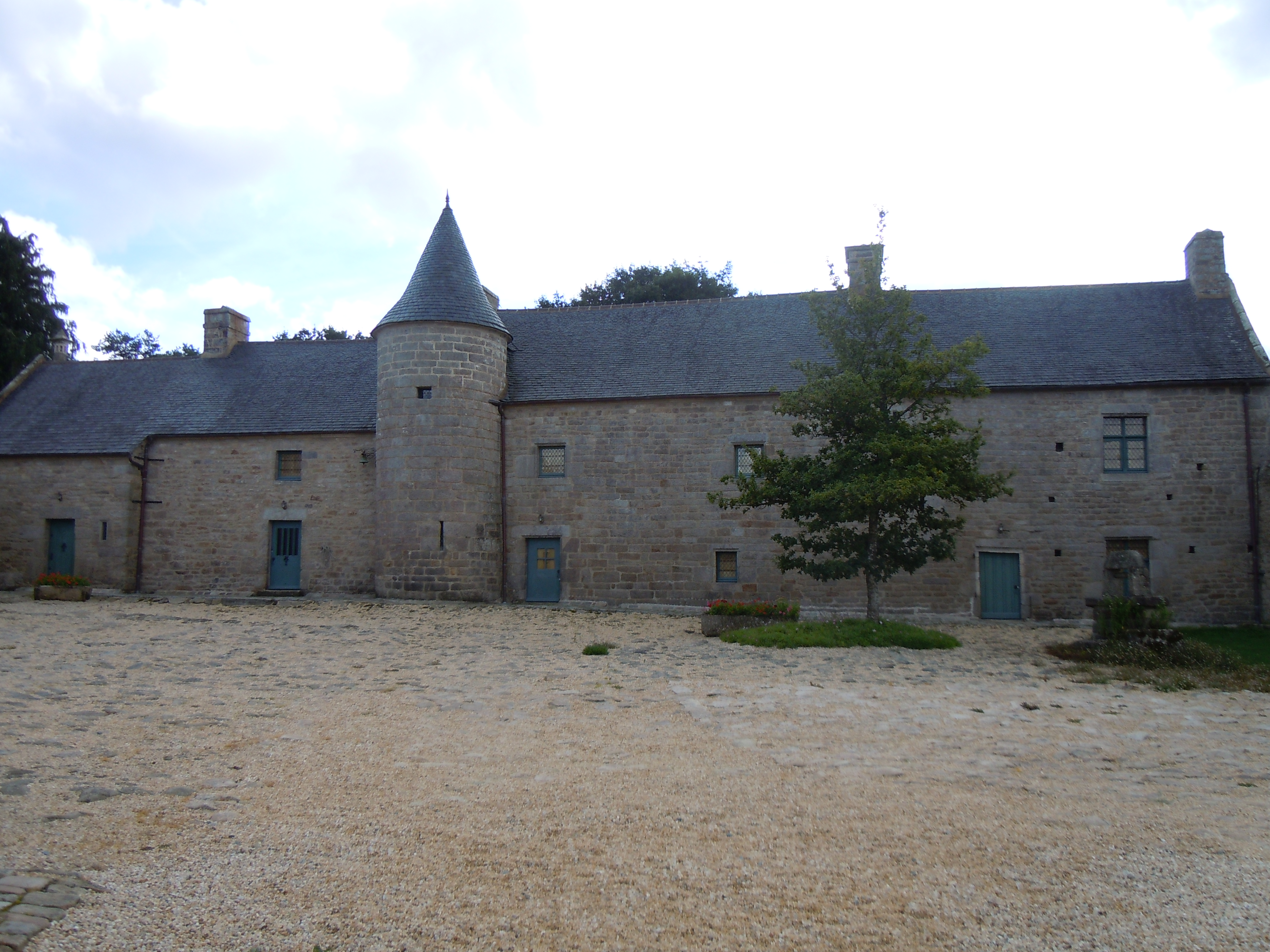 manoir de Kermain, commune de Langonnet, département du Morbihan, France